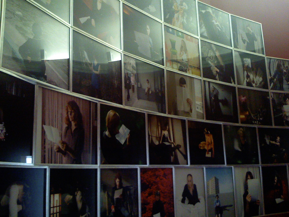 Sophie Calle exhibition.